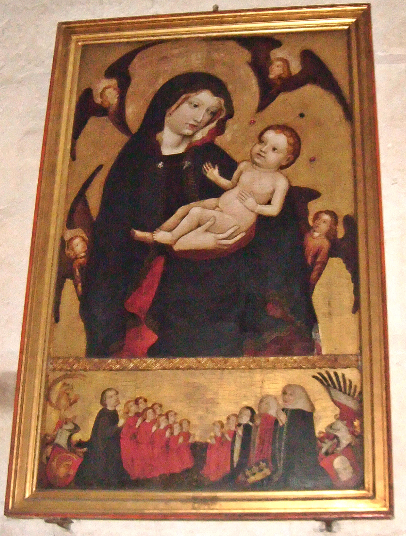 Sogenannte "Imhoff Madonna", Nürnberg St. Lorenz (Epitaphbild von Christian Imhoff für seine Frau Margarethe geb. Thürler, + 1449)